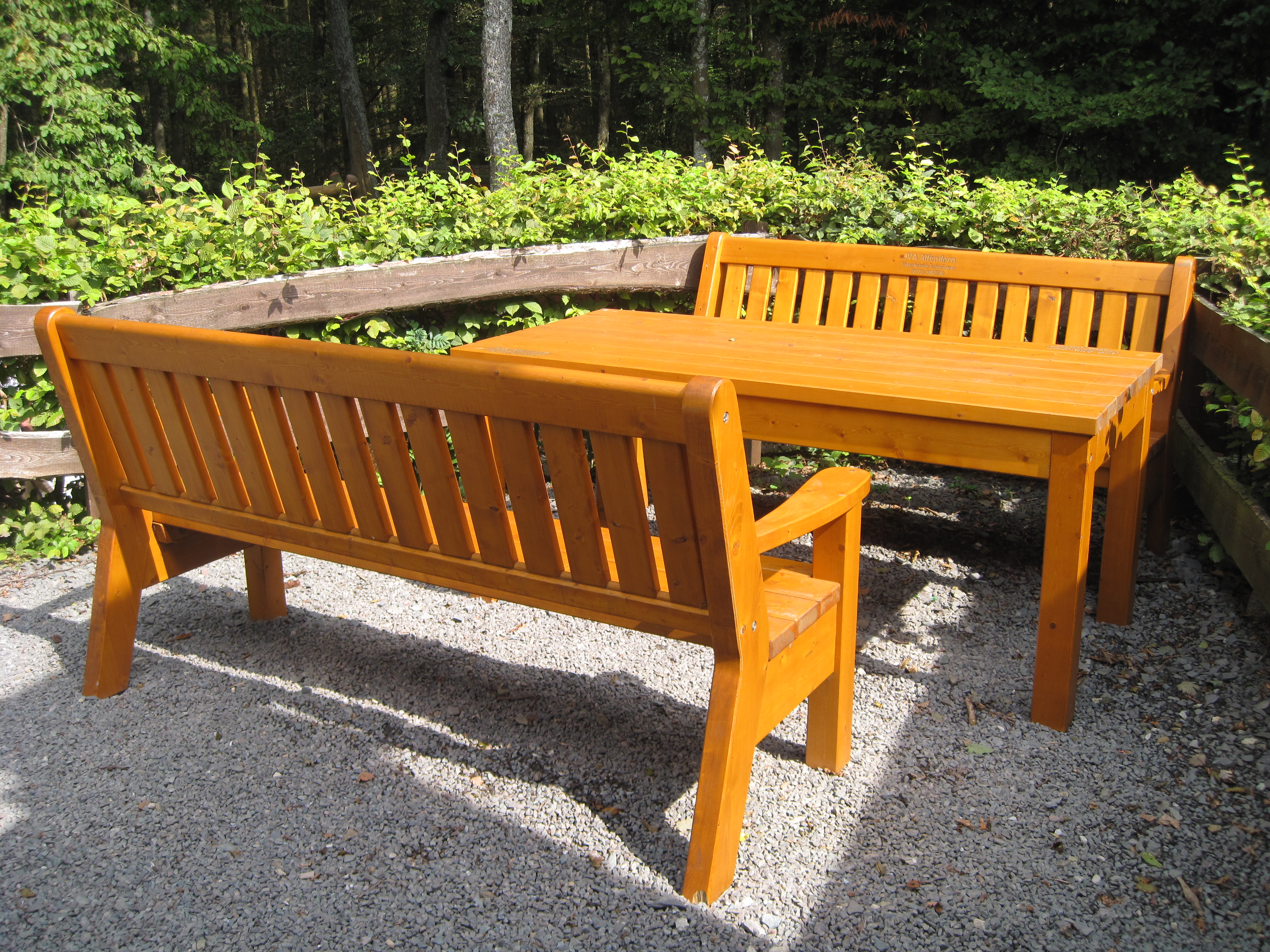 Gartenmöbel am SGV-Heim Biggeblick in Attendorn. Gefertigt im Eigenbetrieb Schreinerei der Justizvollzugsanstalt Attendorn|.